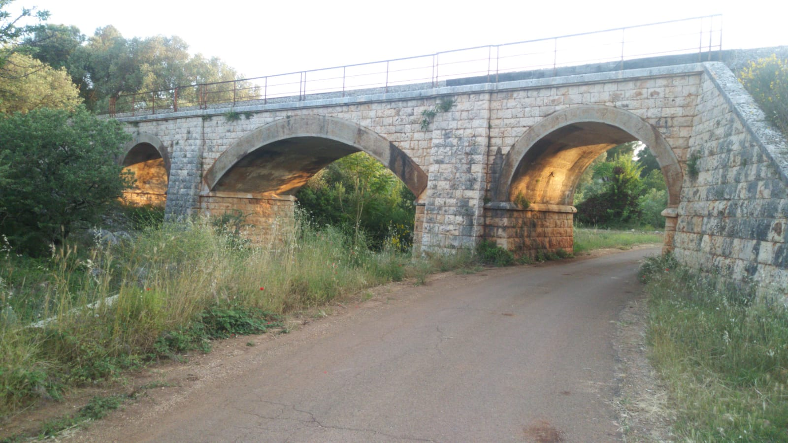 Un piccolo viadotto ferroviario della linea Martina Franca-Lecce passante per Francavilla Fontana, in contrada Capece (tratto Francavilla-Ceglie).